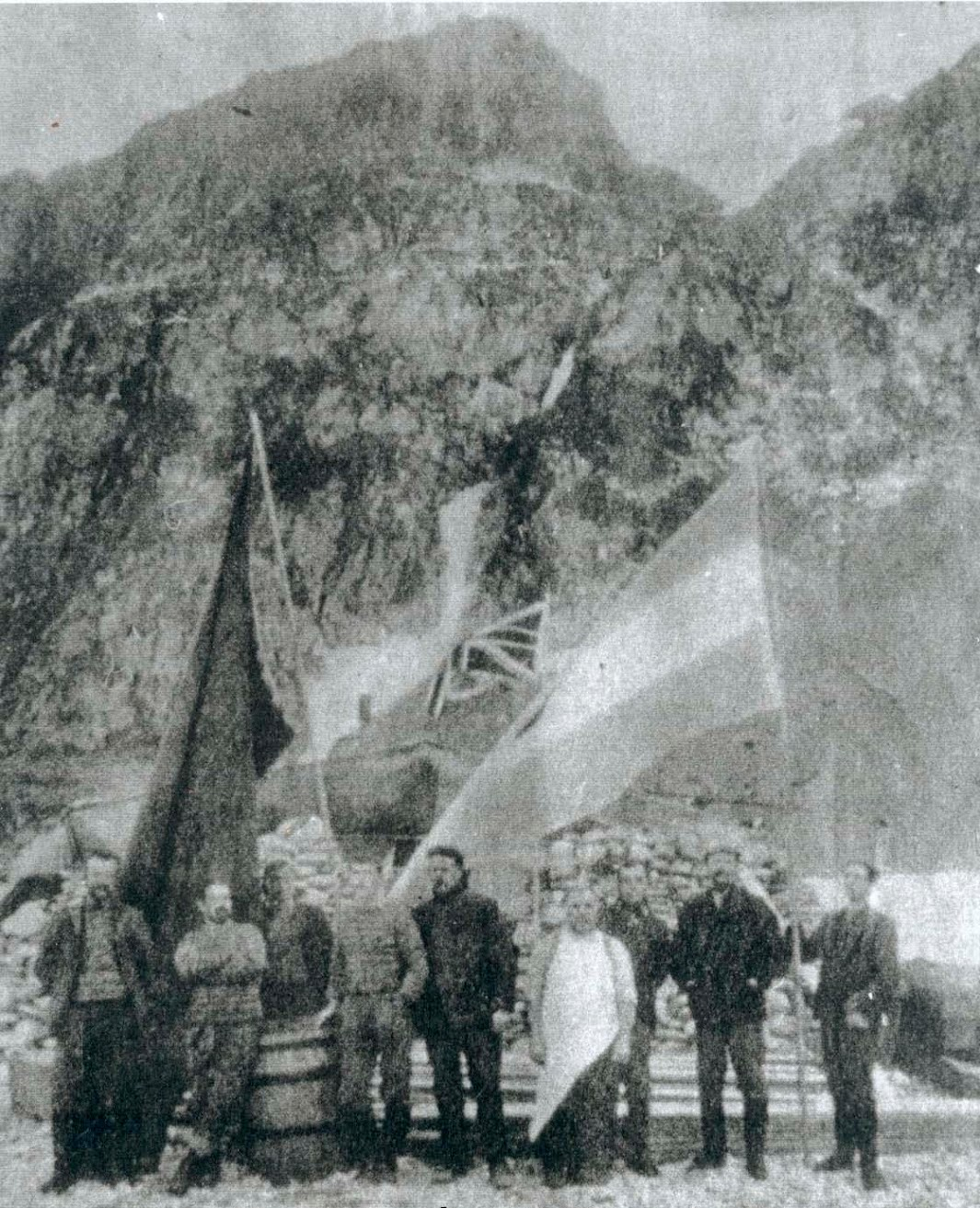 Toma de posesión argentina del observatorio de la Isla Laurie (Orcadas del Sur, Antártida).